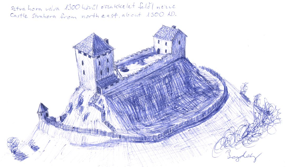 Sztrahora várának rekonstrukciós rajza az 1300-as év körüli állapotában, északkelet felől nézve (a várrom Nógrádsipektől délkeletre kb. 4 kilométerre található a Pusztavár-hegyen)